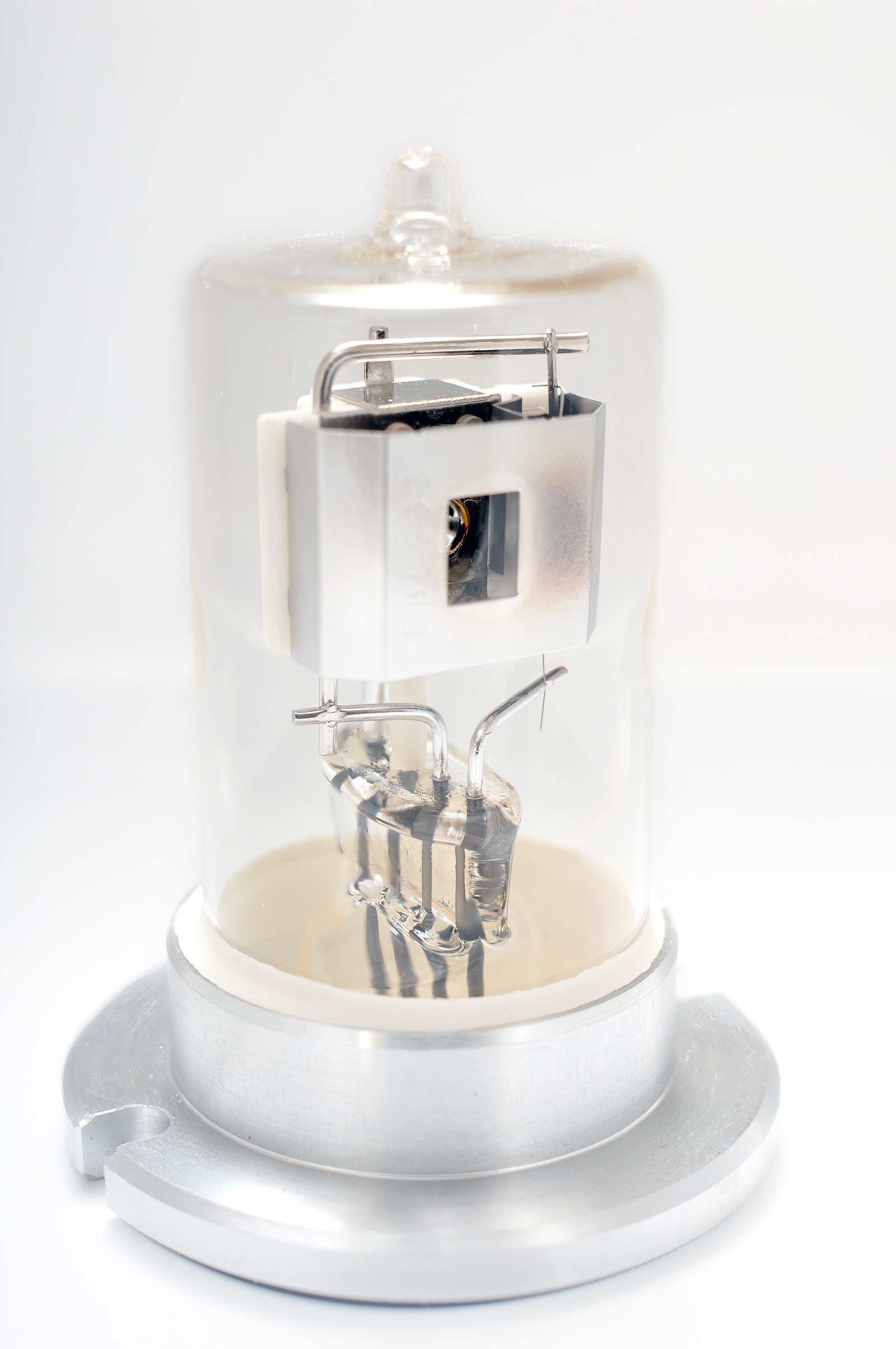 Deuterium arc lamp